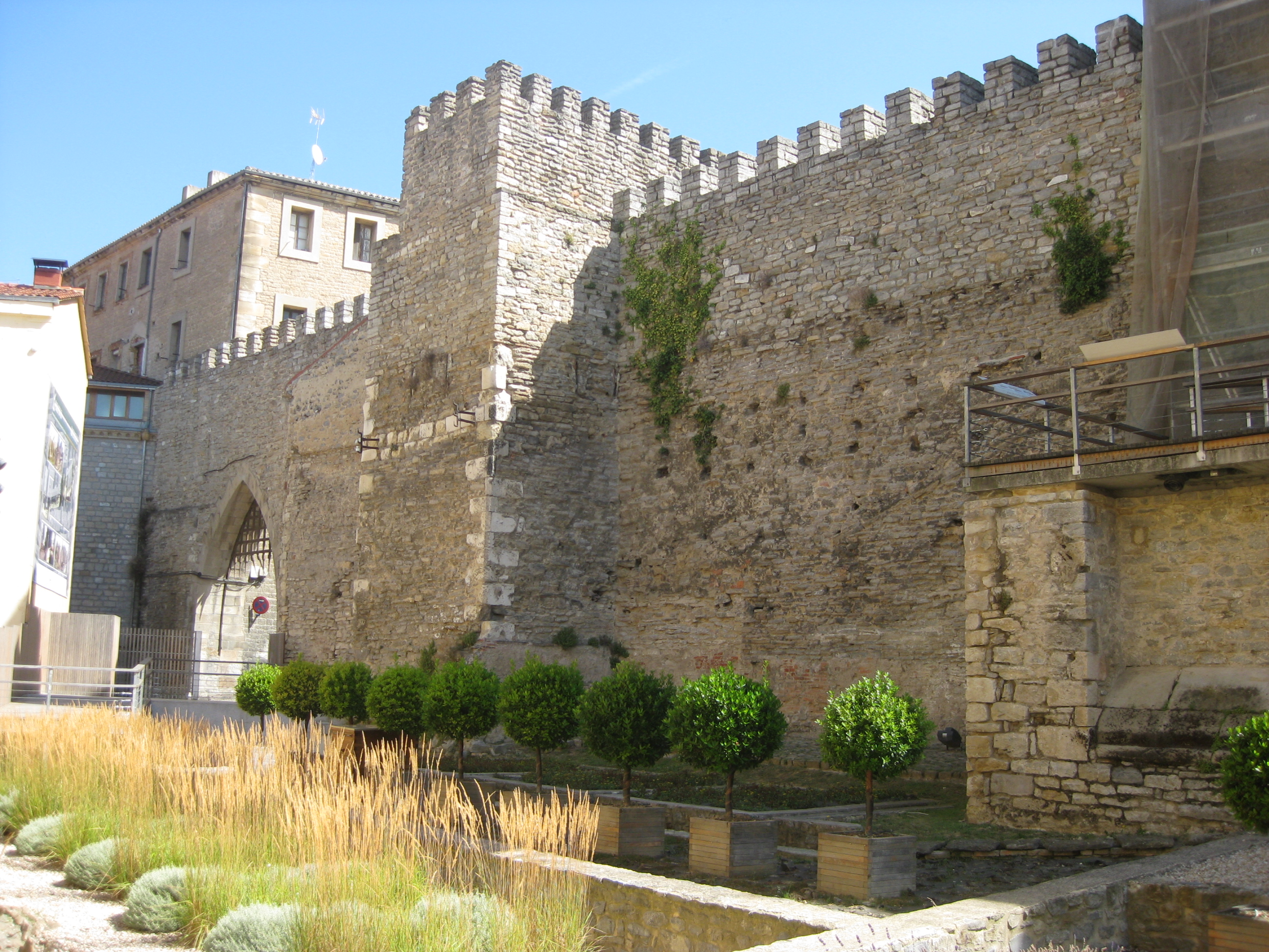 Muralla medieval de Vitoria-Gasteiz en el casco medieval.